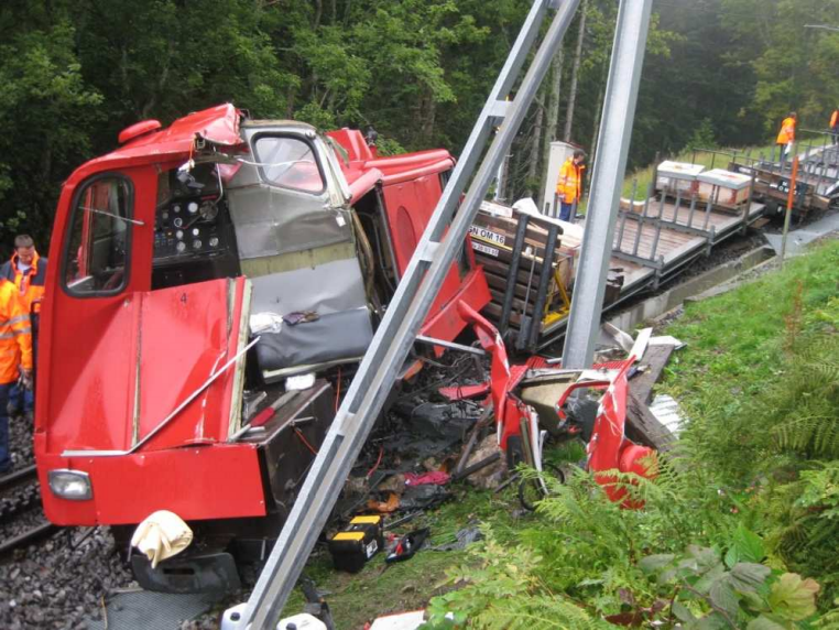 In Paccot am 24. August 2010 verunfallter Diensttriebwagen Hm 2/2 4 der Chemin de fer Montreux–Glion–Rochers de Naye